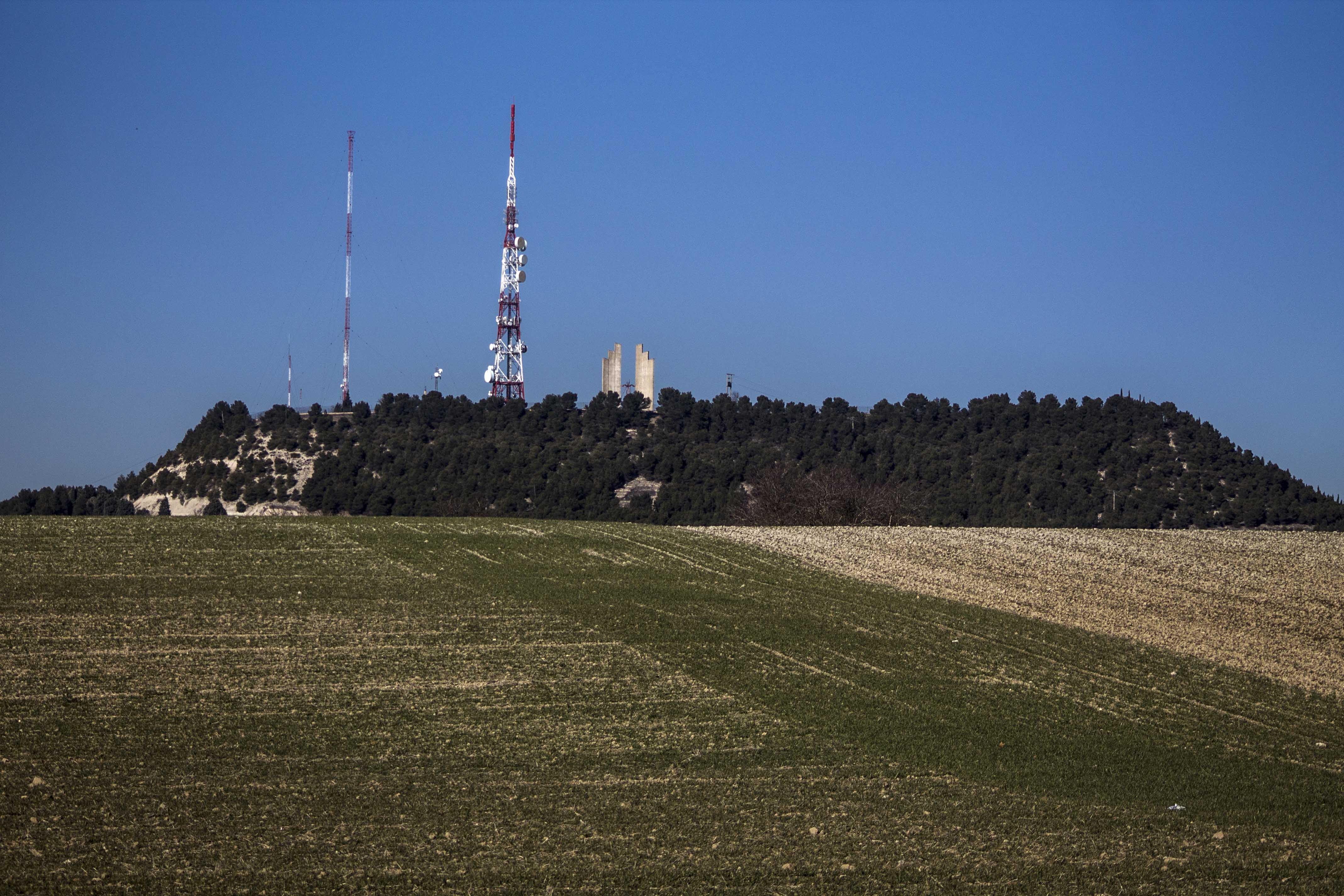 Monumento de Onésimo Redondo (Valladolid)